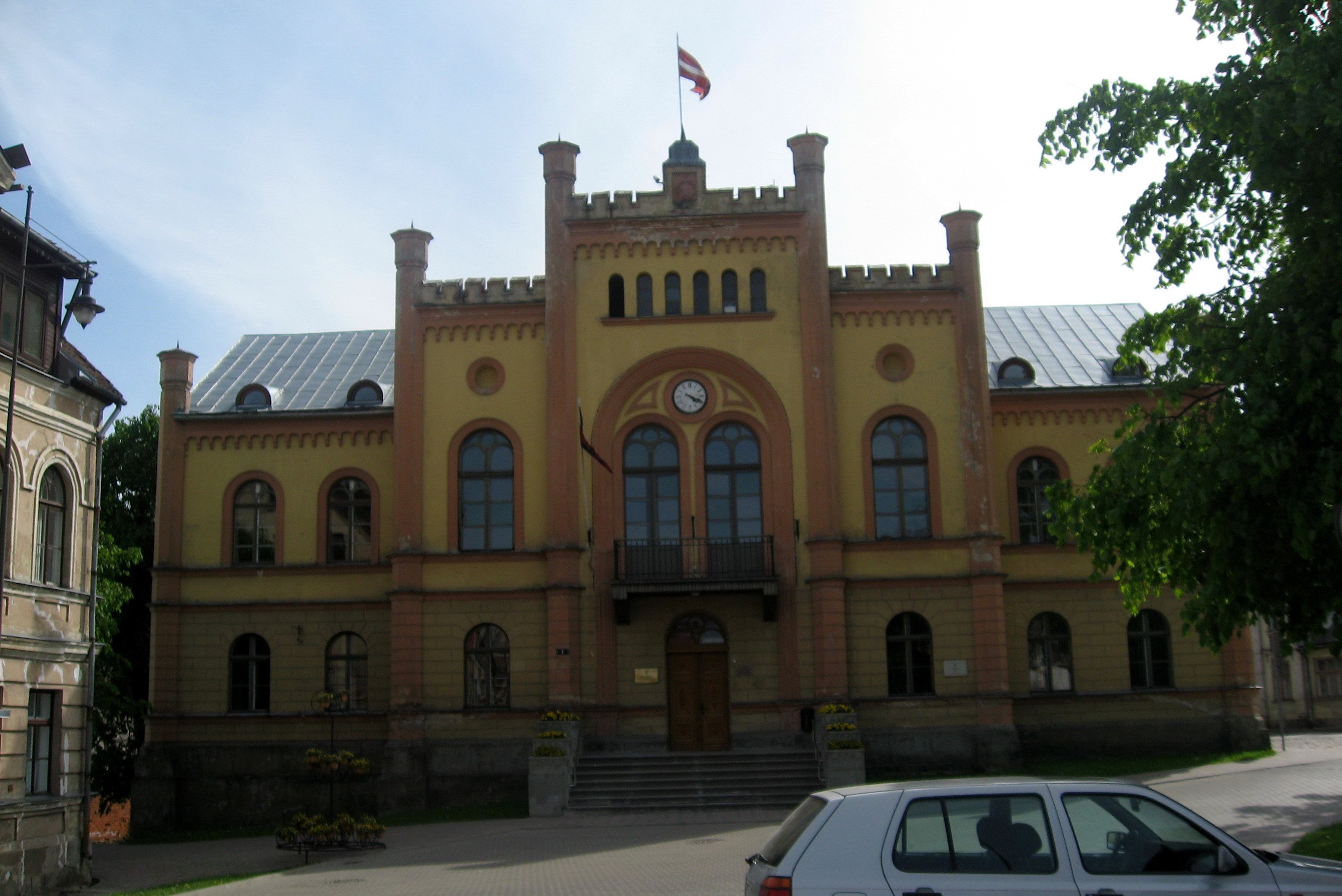 Kuldīga, radnice